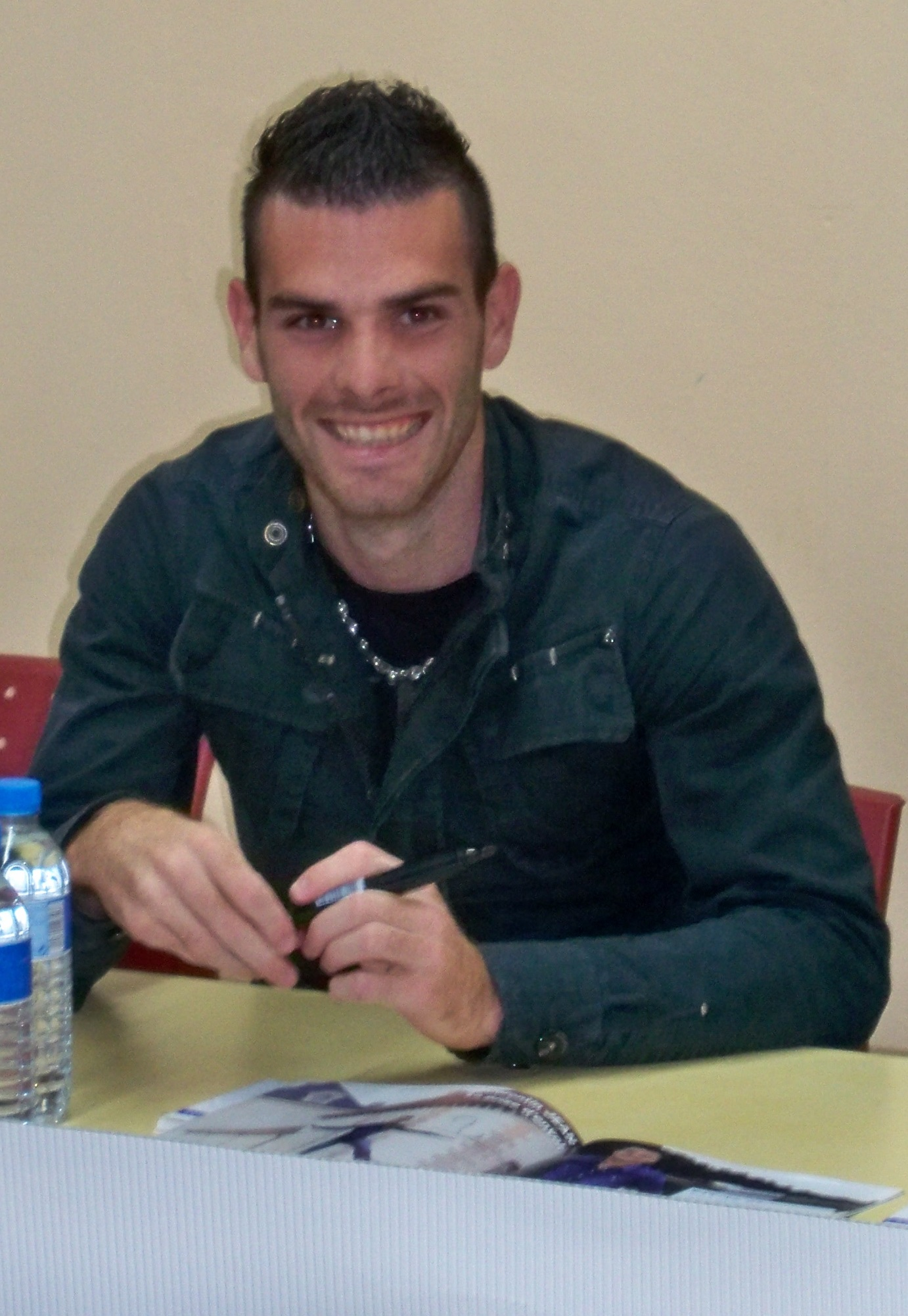 Yoann Court lors d'une séance de dédicace organisé par l'ESTAC à l'Intermarché de Saint-Julien-les-Villas.